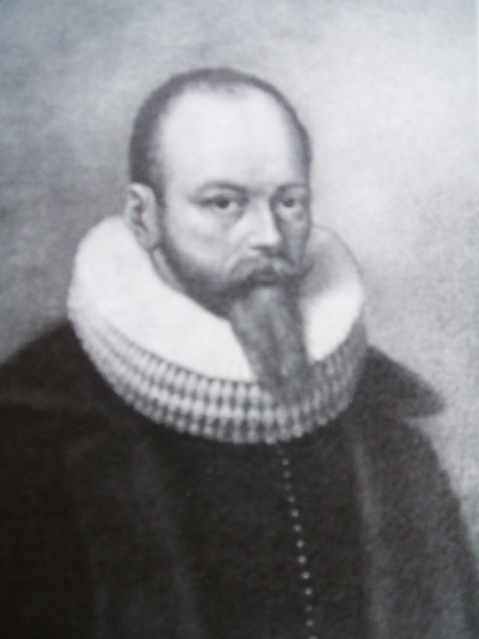 Das Foto zeigt Lambert Steinwich. Es handelt sich hier um ein Ölgemälde auf Leinwand von H. Paul, kopiert nach einem Porträtmedaillon im Epitaph Steinwichs in St Nikolai.